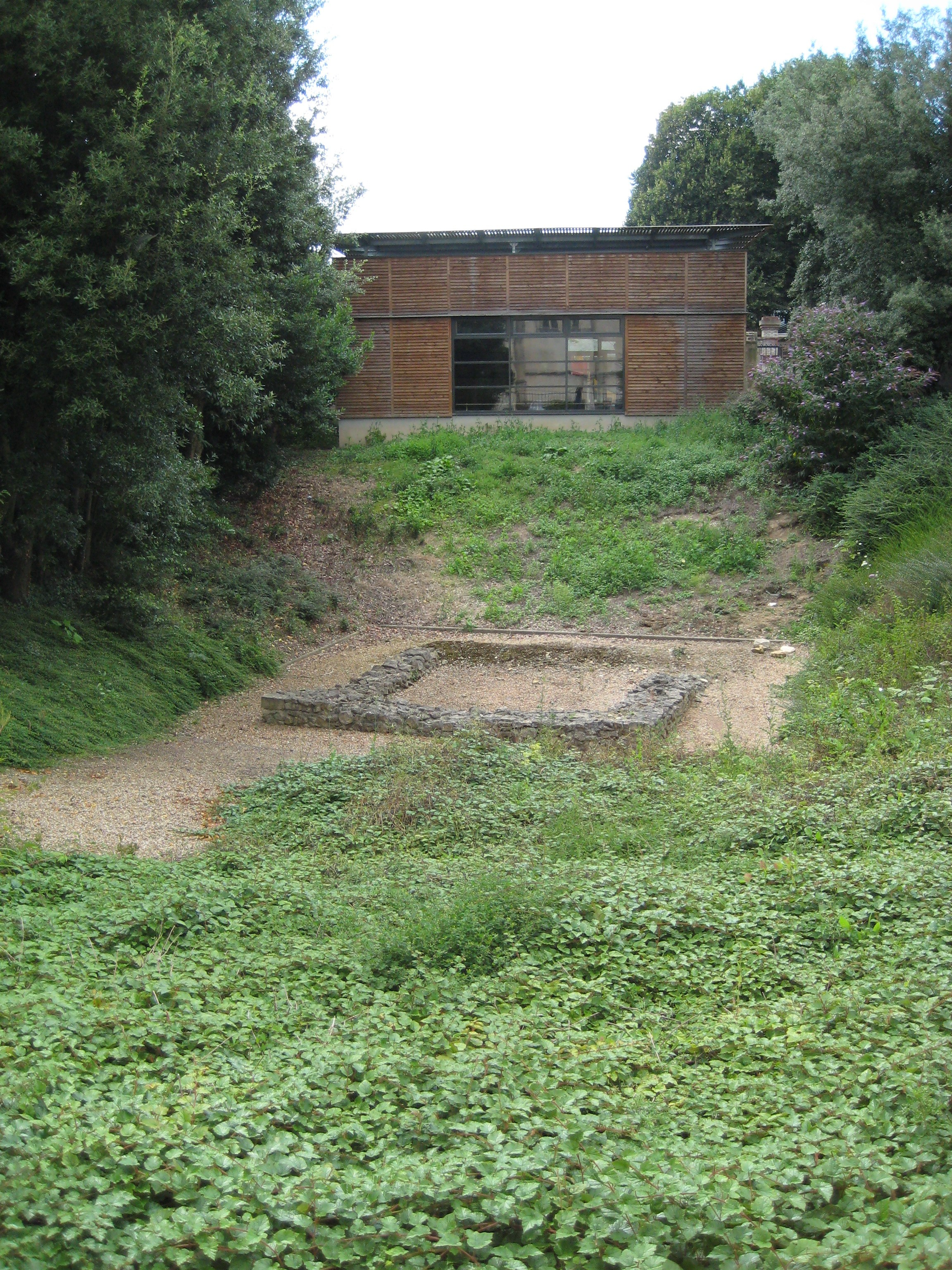 Vestiges du fanum retrouvé dans l'enceinte de l'abbaye aux Hommes de Caen